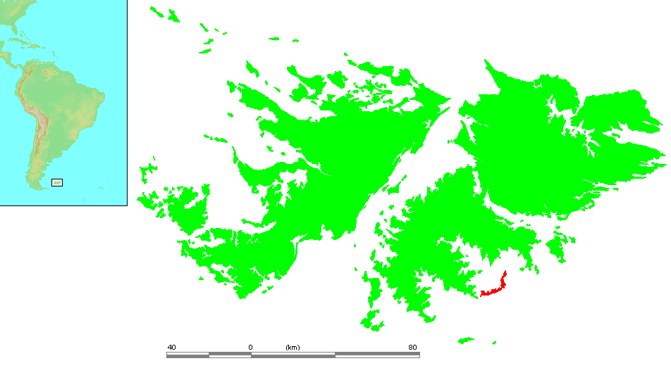 Falkland Islands - Bleaker Island.PNG